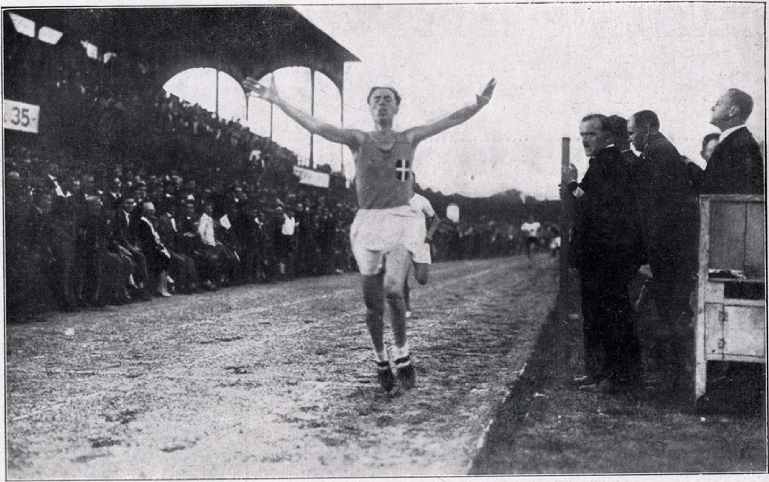 Ettore Tavernari vince gli 800 metri a Praga nel luglio 1927. Immediatamente dietro di lui il boemo Vilem Sindler